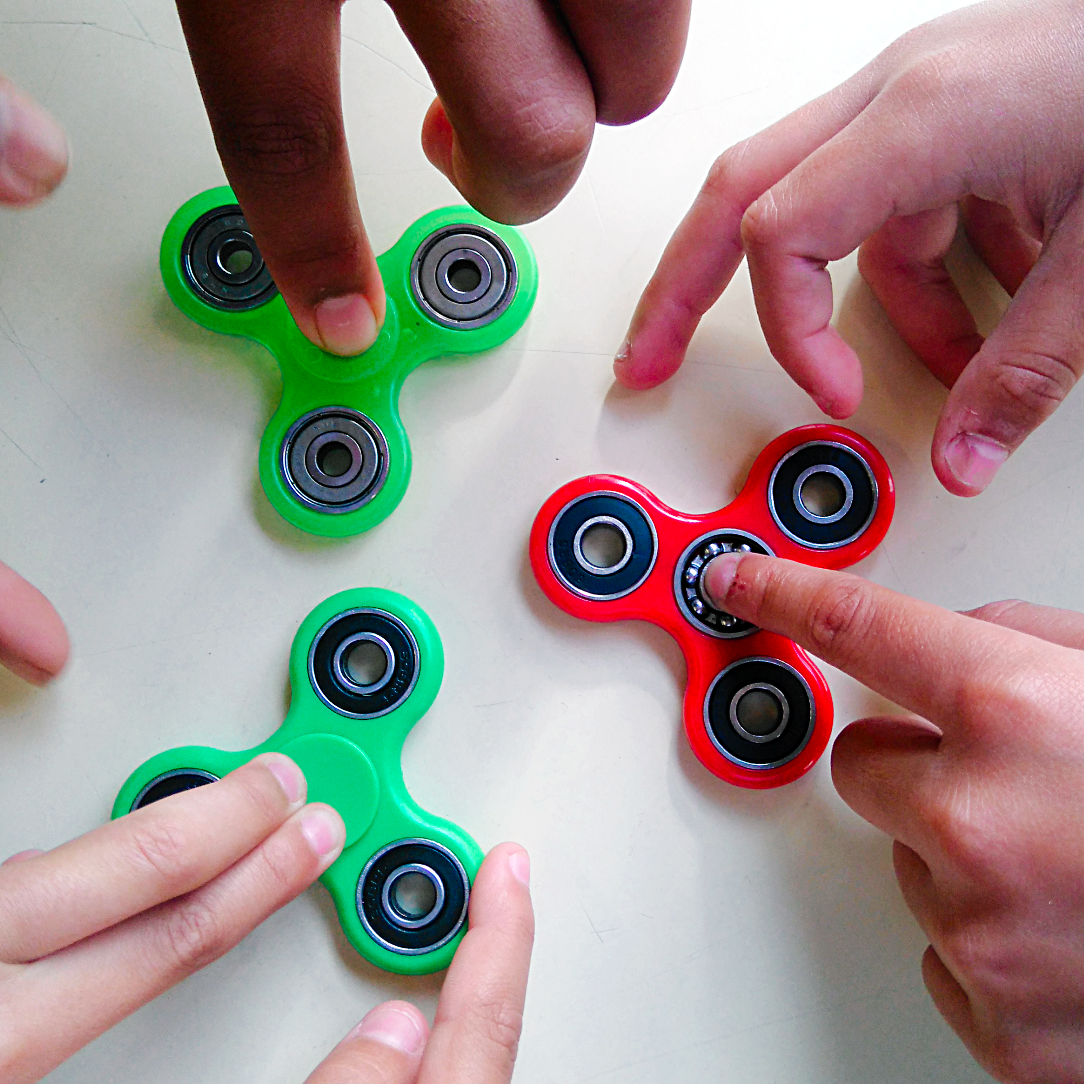 Alumnat de secundària jugant amb baldufes de mà.